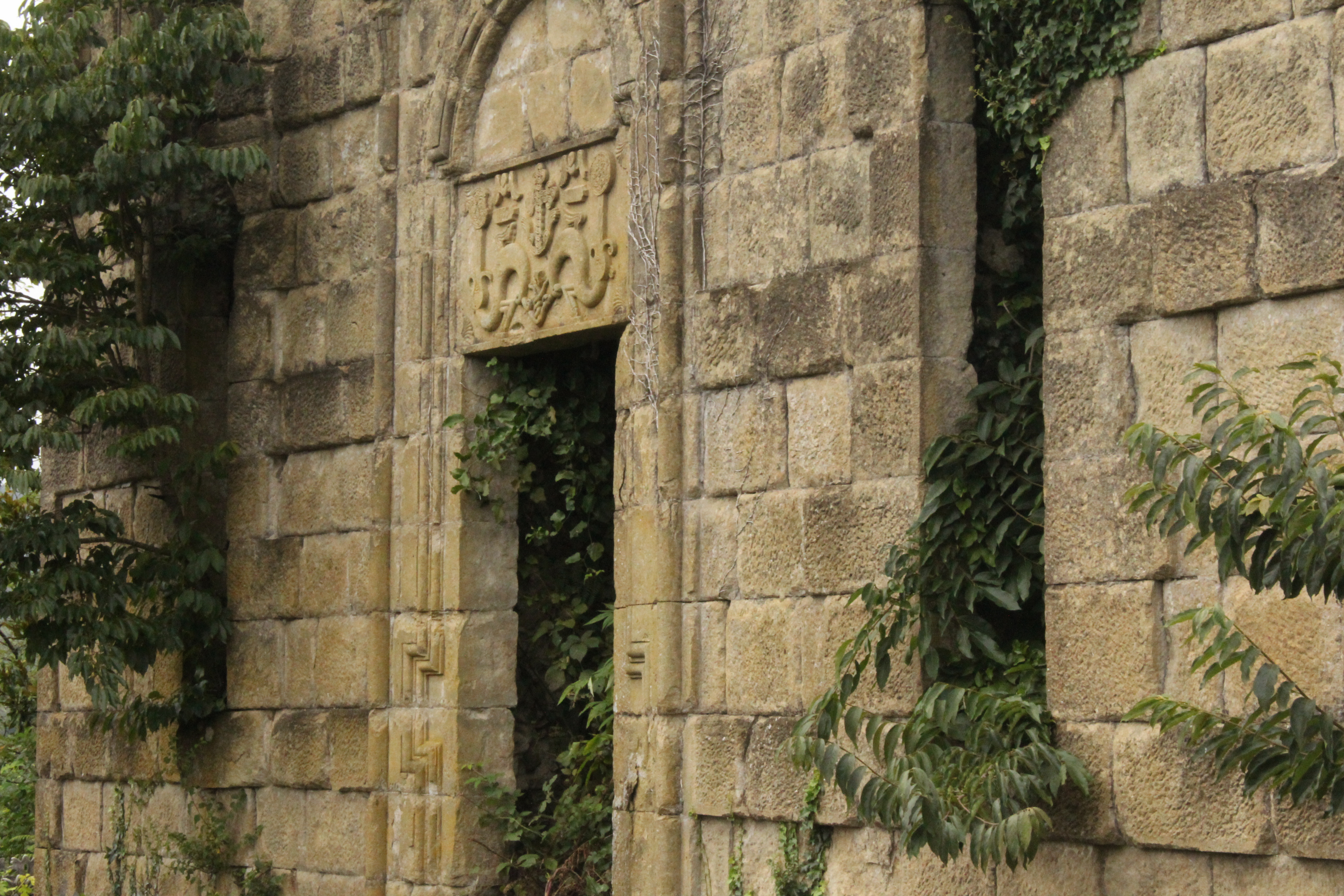 აკეთის წმინდა გიორგის ტაძრის ნანგრევები